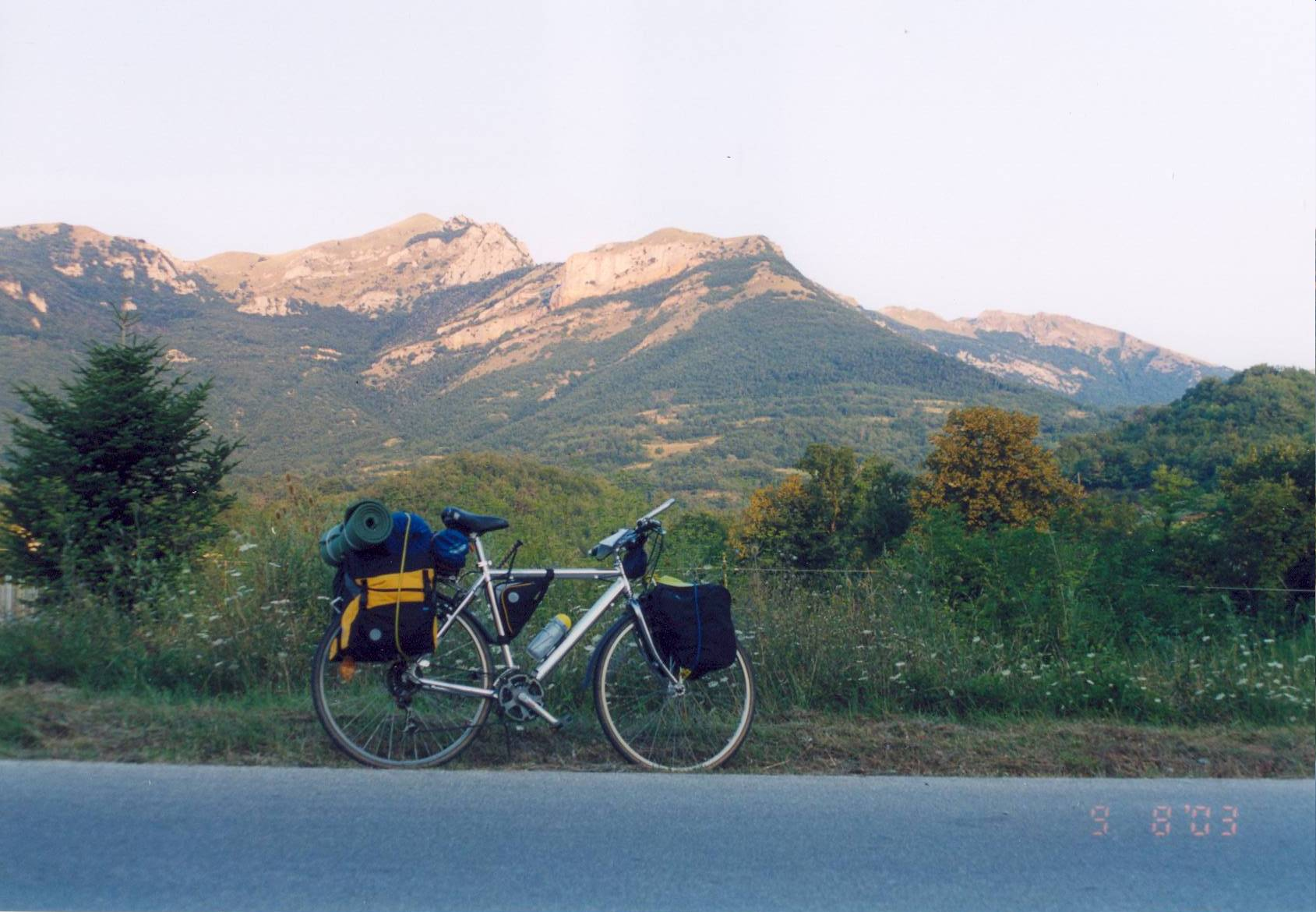 Monti Sibillini Italie